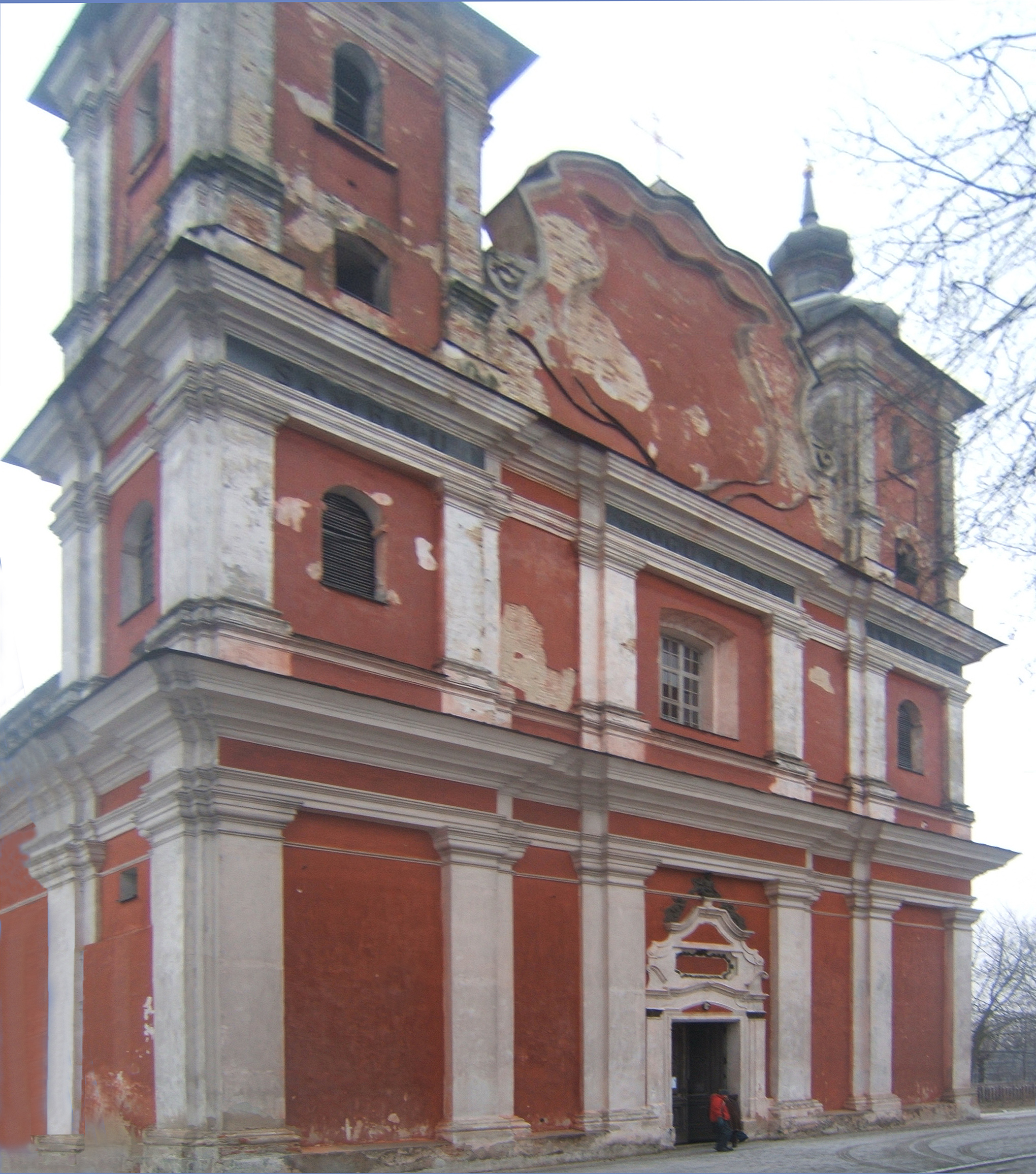 Kościół katolicki w Dąbrowicy.